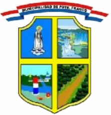 Escudo de Pdte. Franco (Paraguay).